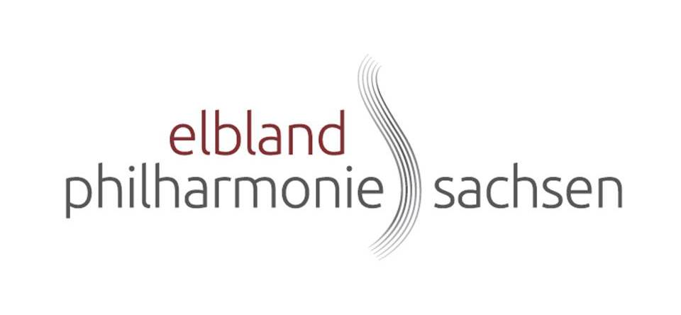 Logo der Elbland Philharmonie Sachsen